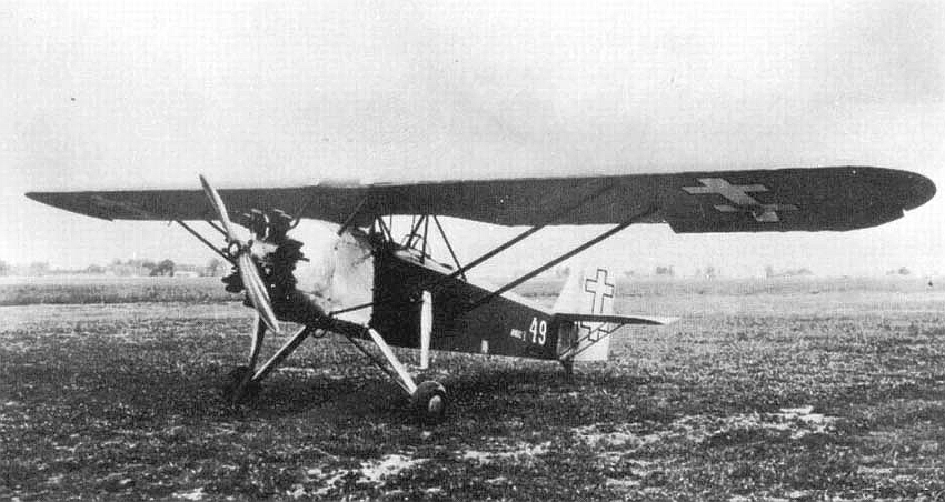 Litewski samolot szkolny ANBO-V.